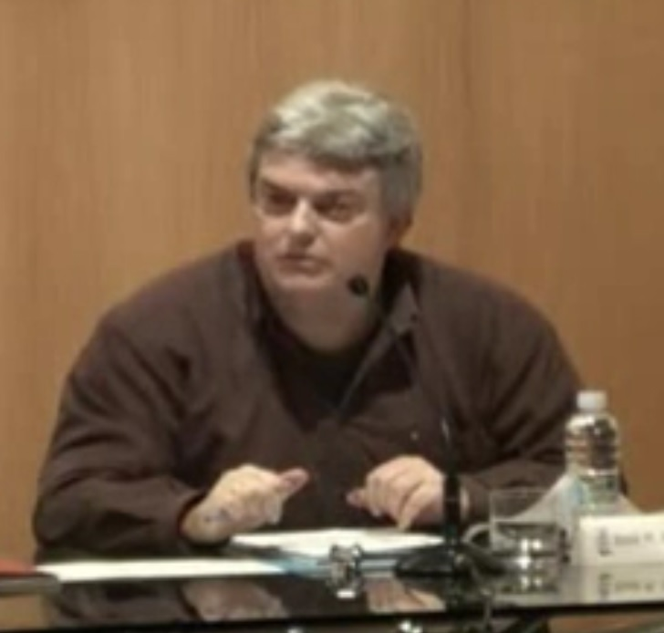 Xosé M. Núñez Seixas en la conferencia A escrita popular, a memoria e a historia el 6 de noviembre de 2008.